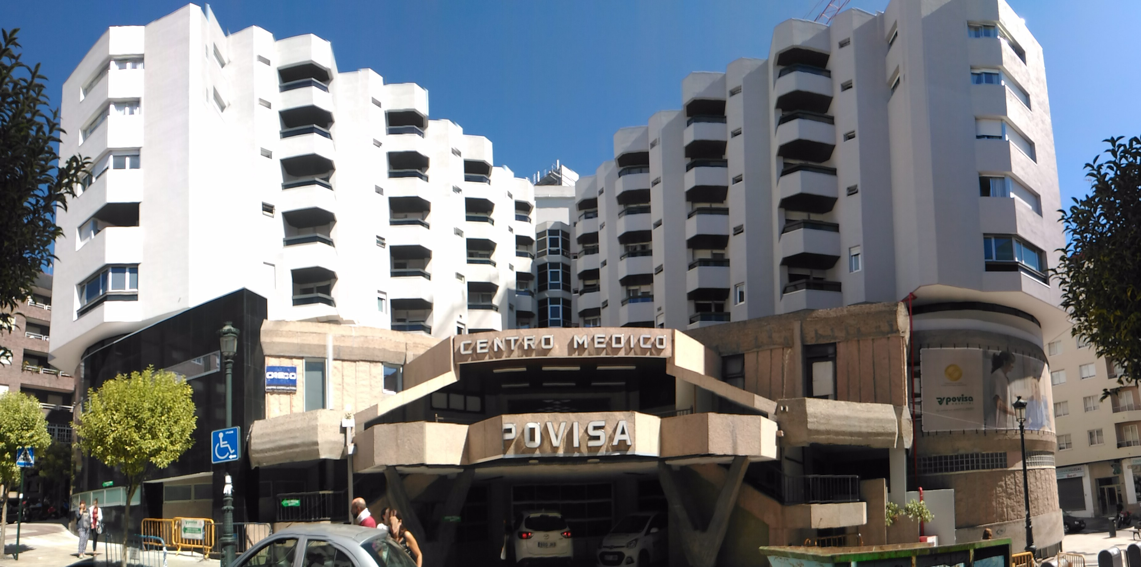 Povisa